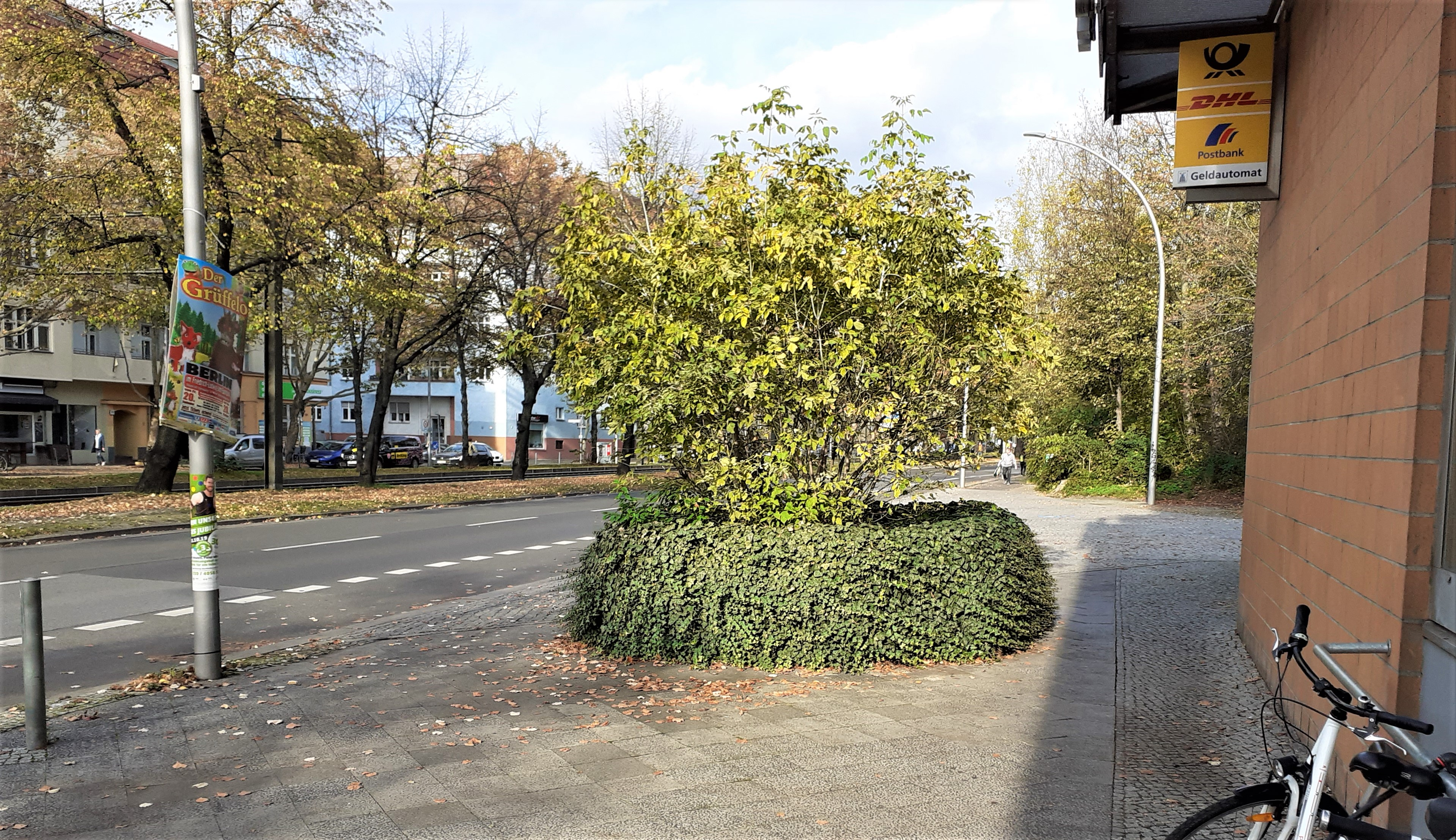 Die Greifswalder Straße ist eine Ein- und Ausfallstraße im Norden Berlins. Auf ihr verläuft die Bundesstraße 2. Die von Efeu umwucherte erhöhte Baumscheibe ist das Relikt, der vor der Wohnbebauung Mitte der 1970er Jahre hier liegenden Kleingartenanlagen. Das Gelände lag vorher in Höhe der erkennbaren Bepflanzung. Um den hier stehenden Straßenbaum zu erhalten wurde die Baumscheibe belassen und ummauert. Seit den 2010er Jahren ist der Baum nicht mehr erhalten und wurde entsorgt. Verblieben ist ein Busch innerhalb der efeuüberwachsenen Ummauerung.